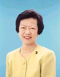 Minister Mayumi Moriyama.